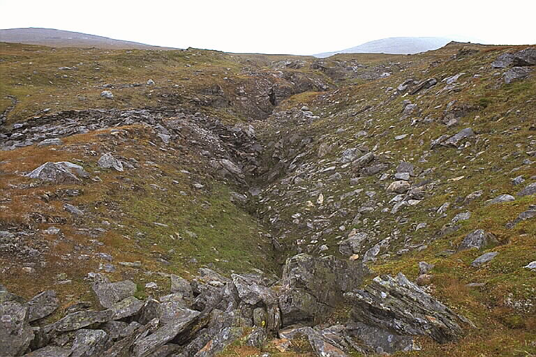 RAÄ-nummer Jokkmokk 1296:1. Lämningar efter silverbrytning. Laponia Motiv: Jokkmokk 1296:1 Nyckelord: Riksintressen, Världsarv Kategori: Gruvhål RAÄ-nummer Jokkmokk 1296:1. Lämningar efter silverbrytning. Laponia. Jokkmokk 1296:1.